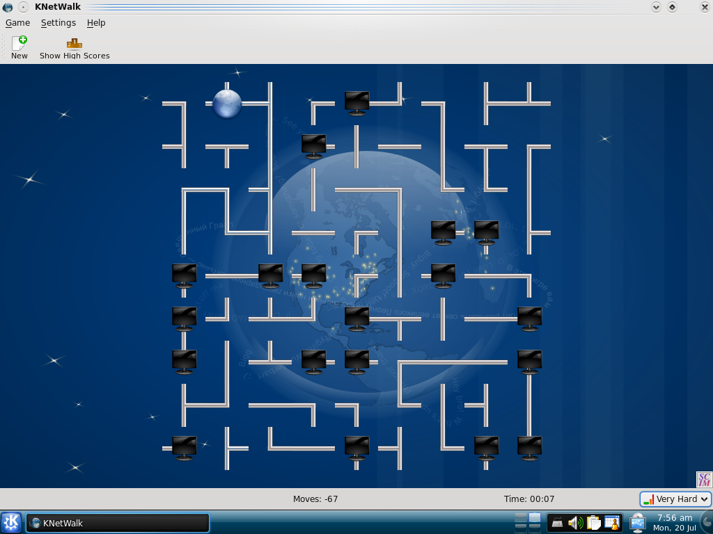 കെ.ഡി.ഇ.യുടെ ഭാഗമായ kdegames പാക്കേജിലെ ഒരു കളിയാണ്‌ കെനെറ്റ്‌വാക്ക്(Knetwalk). ഗ്നൂ സാർവ്വജനിക അനുവാദപത്രം അനുസരിച്ചാണ്‌ ഇത് വിതരണം ചെയ്യപ്പെടുന്നത്. Tactics & Strategy വിഭാഗത്തിലാണ്‌ ഈ കളി പെടുന്നത്. ആൻഡി പെരെദ്ര്, തോമസ് നാഗി, ഫെല വിങ്കെൽമോലെൻ എന്നിവർ ചേർന്നാണ്‌ ഈ കളി വികസിപ്പിച്ചത്